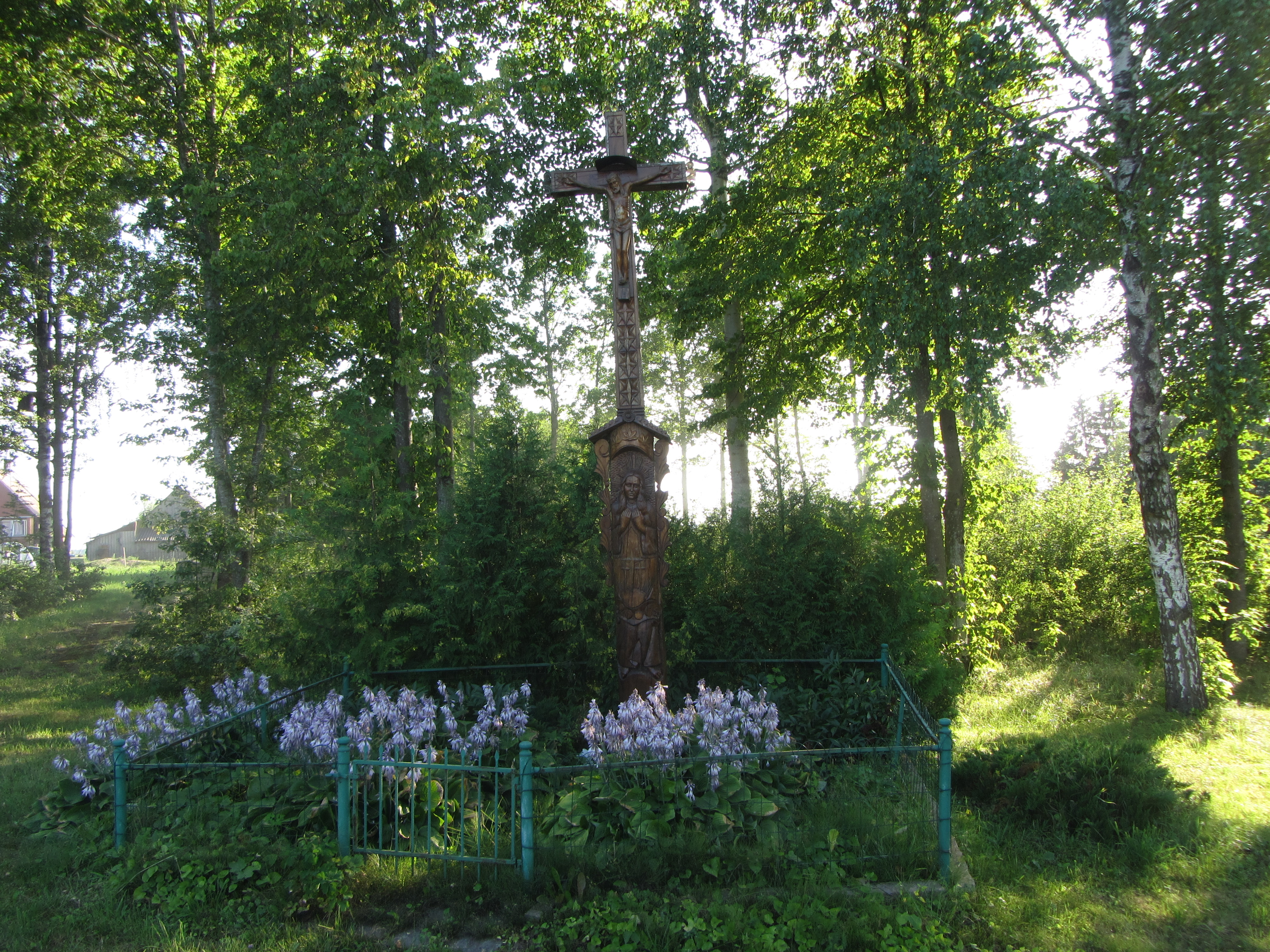 Šiūlėnai, Lithuania